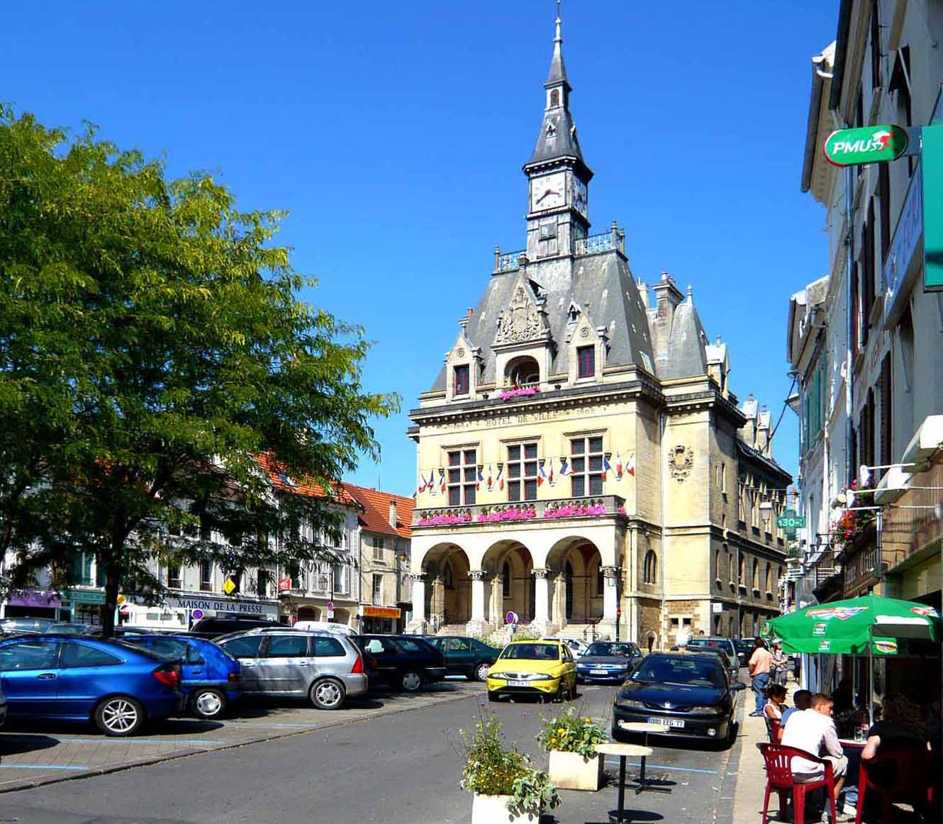 La Ferté-sous-Jouarre aux confins de la Brie et de la Champagne, France